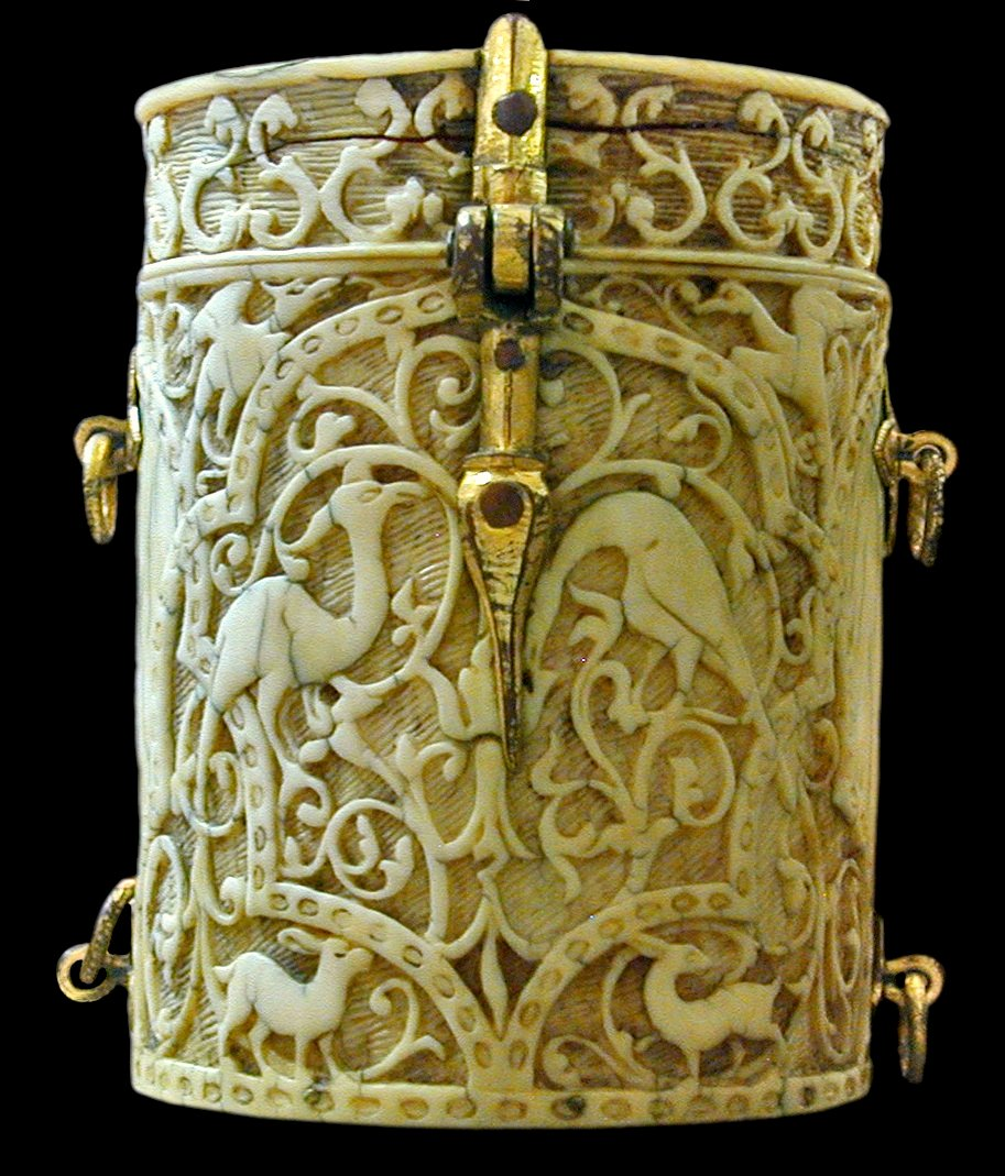 Boite en ivoire de l'Inde (17ème siècle) musée islamique du Caire